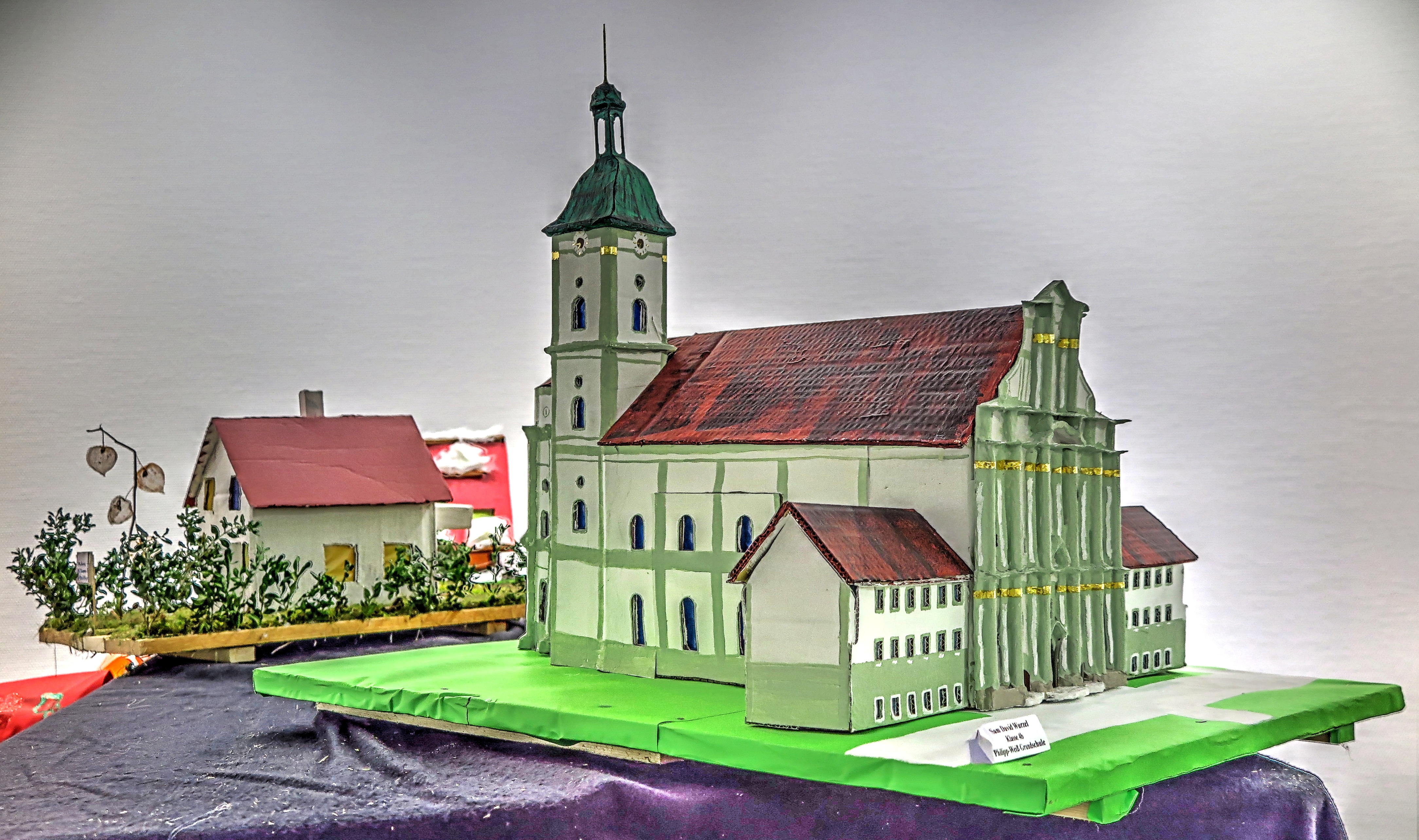 Deutschland, Bayern, Oberbayern, Landkreis Fürstenfeldbruck, Kreisstadt Fürstenfeldbruck, Lucienhäuschen; als Motiv dient die Klosterkirchen St. Mariä Himmelfahrt von Fürstenfeld